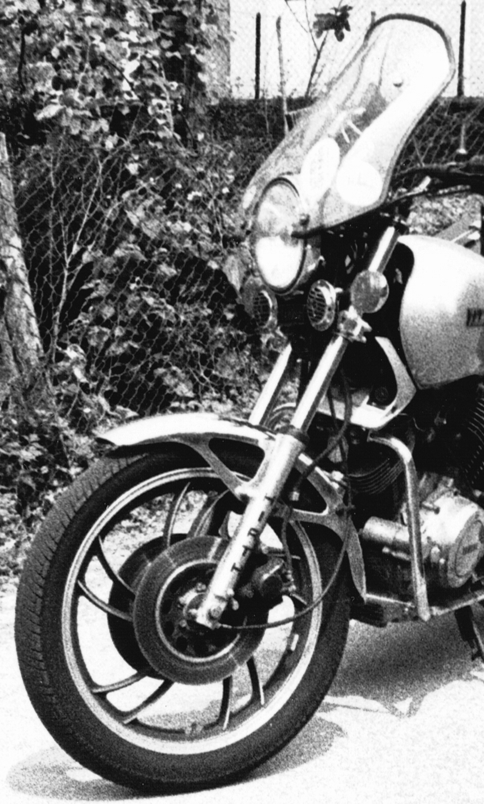 Yamaha TR 1, Bj. 1981